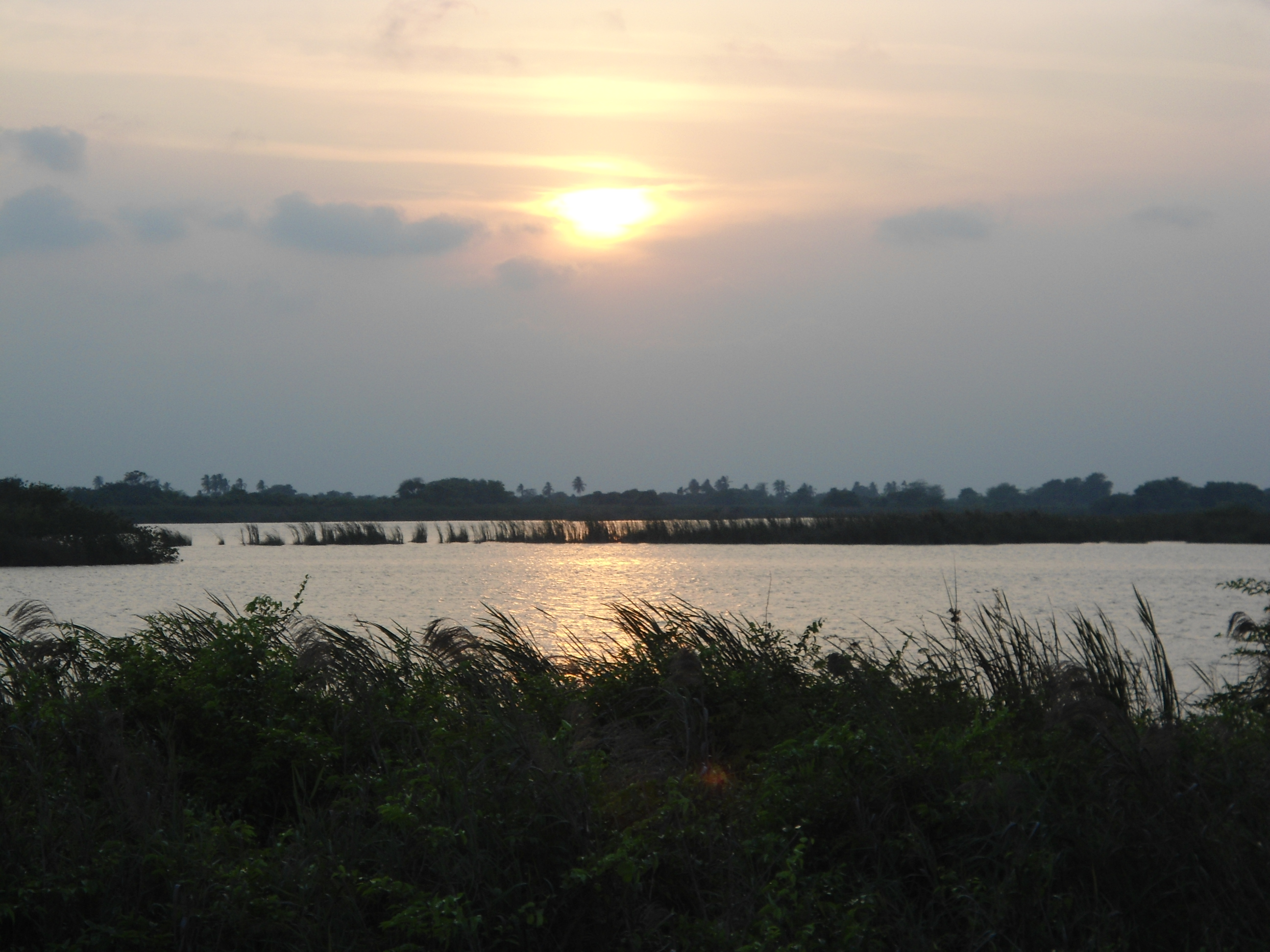 Atardecer en la Reserva de la Biosfera "Pantanos de Centla". Municipio de Centla. Tabasco. México.